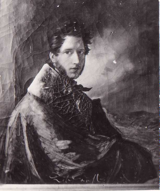 CARL TIMOLEON von NEFF, self portrait